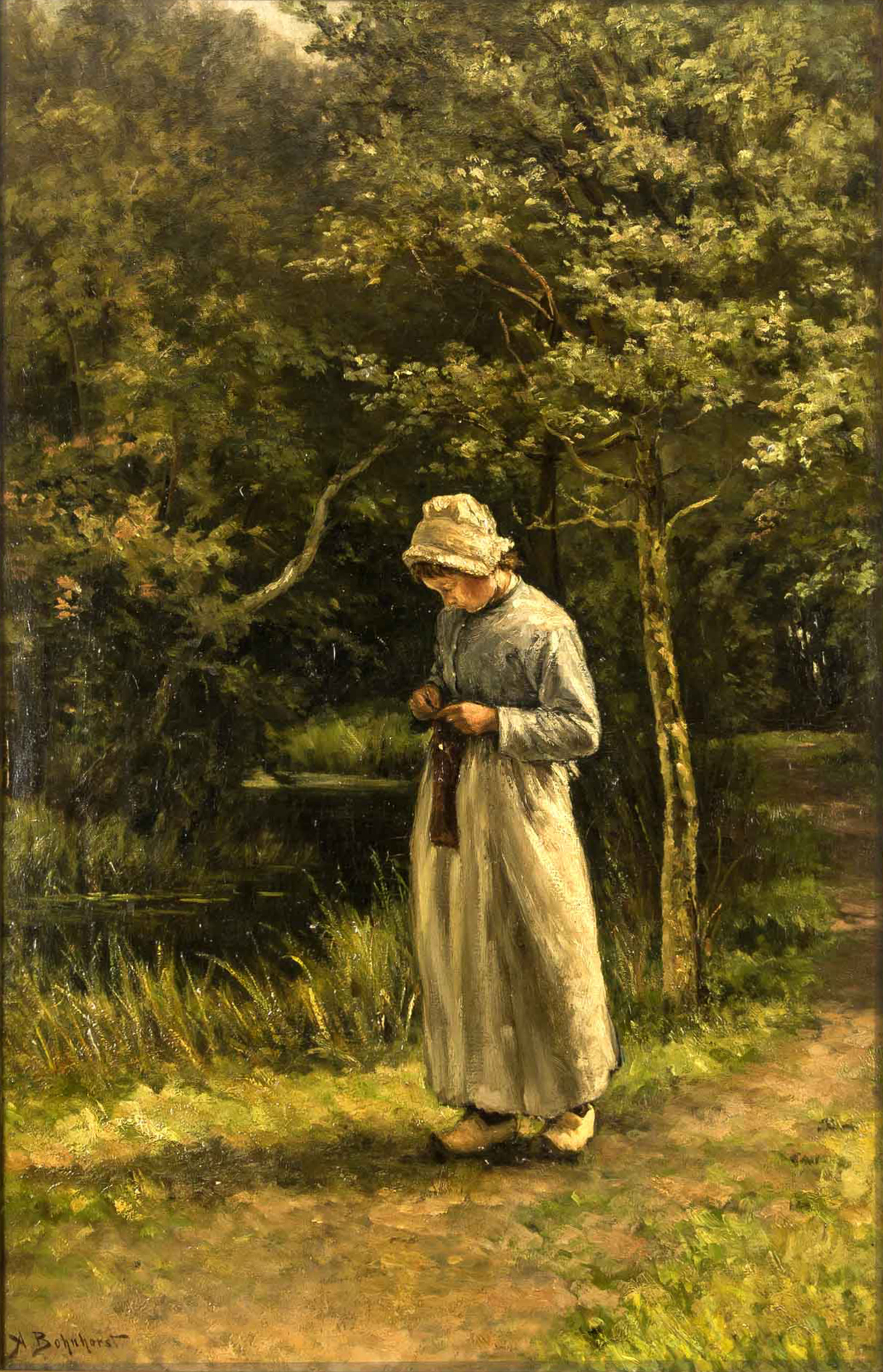 Holländisches Mädchen in Landschaft. Öl auf Leinwand, 81,5 x 51,5 cm